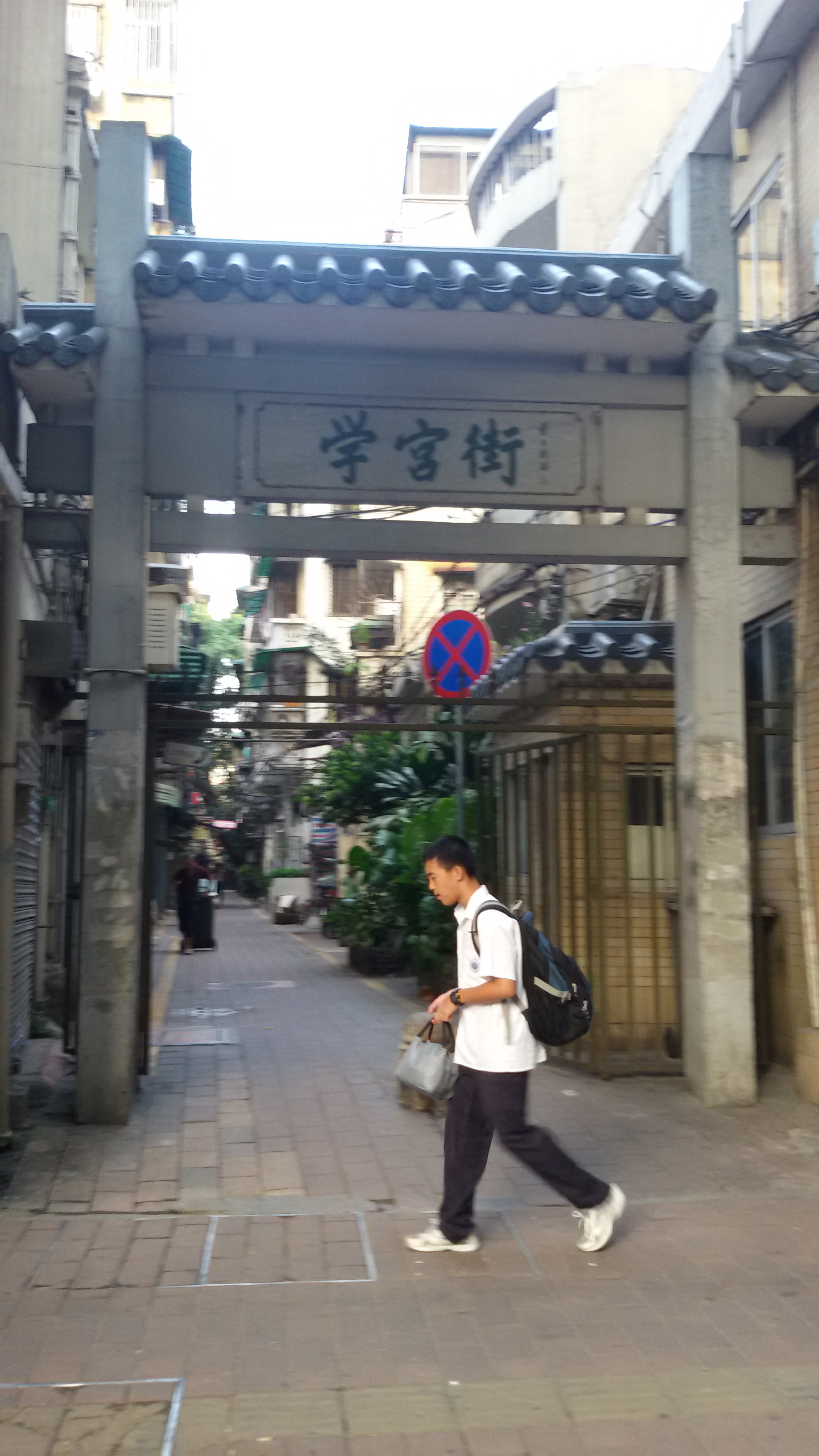 粵語: 学宫街